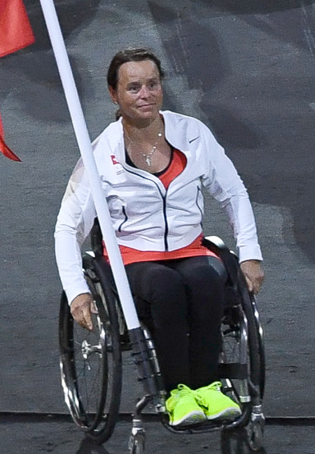 Rio de Janeiro - Cerimônia de abertura dos Jogos Paralmpicos Rio 2016 no Estdio do Maracanã (Tomaz Silva/Agência Brasil)